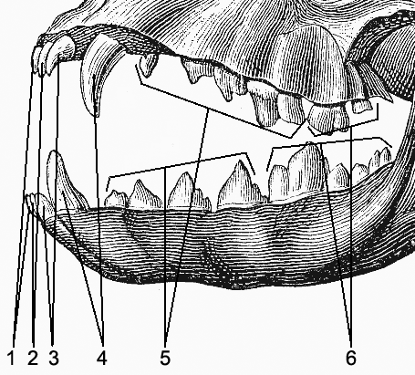 Uzębienie psa